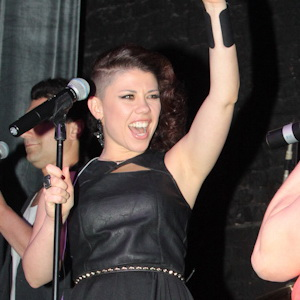 Анна Хохлова и группа «Дискотека Авария» на презентации нового клипа «К.У.К.Л.А.» 26 февряля 2013 года